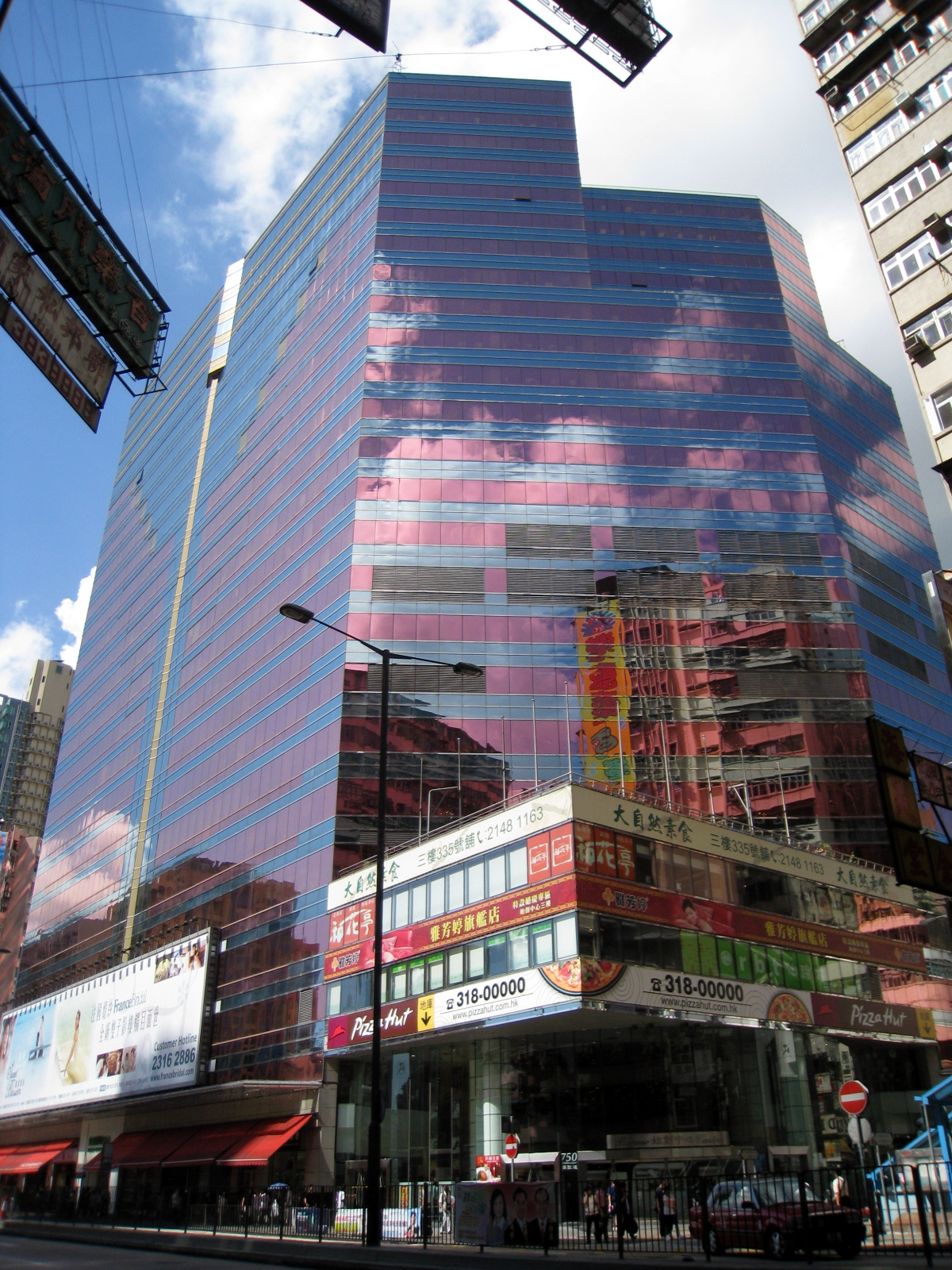 HK Pioneer Centre 始創中心